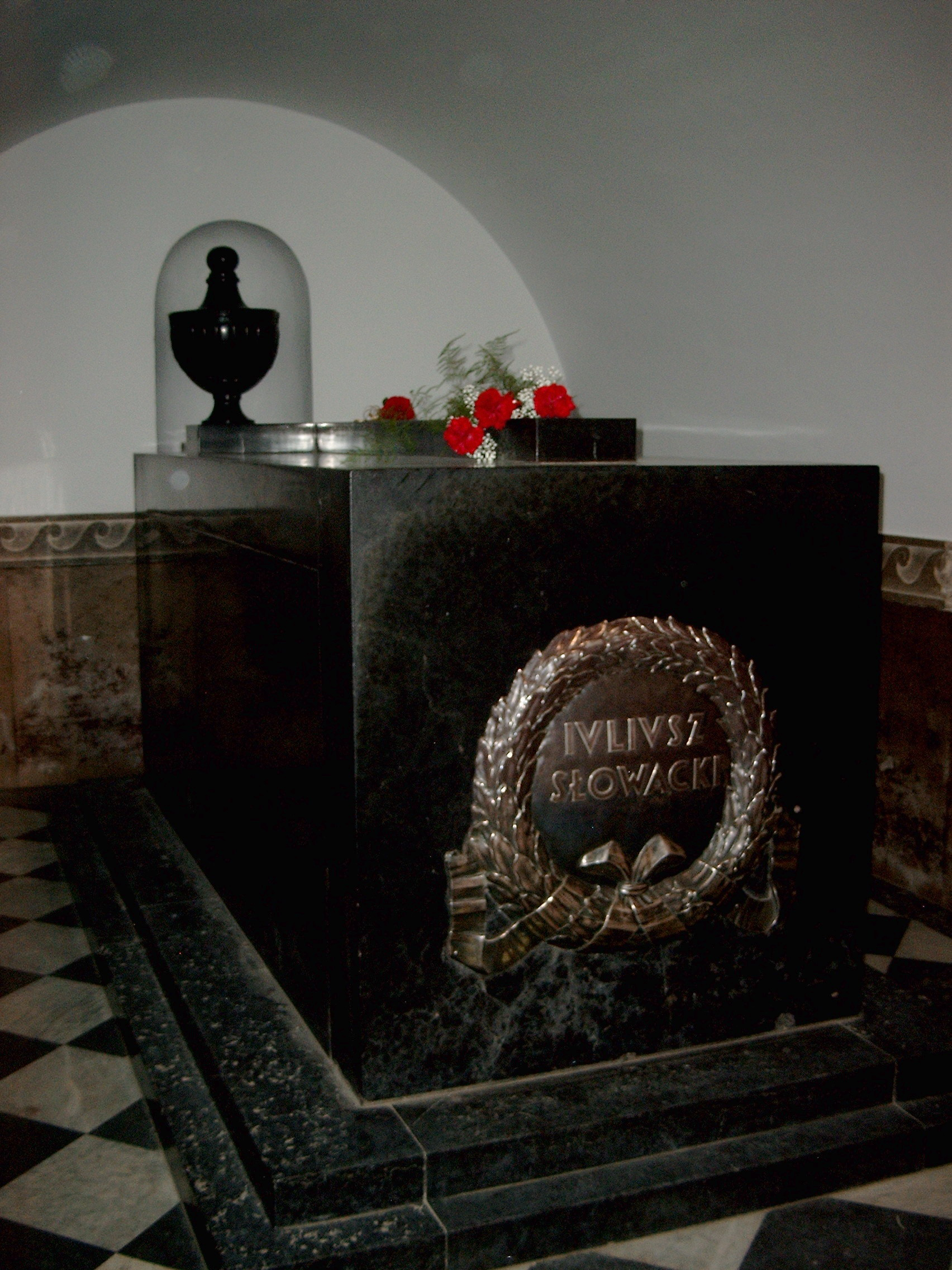 Grobowiec Juliusza Słowackiego w katedrze na Wawelu